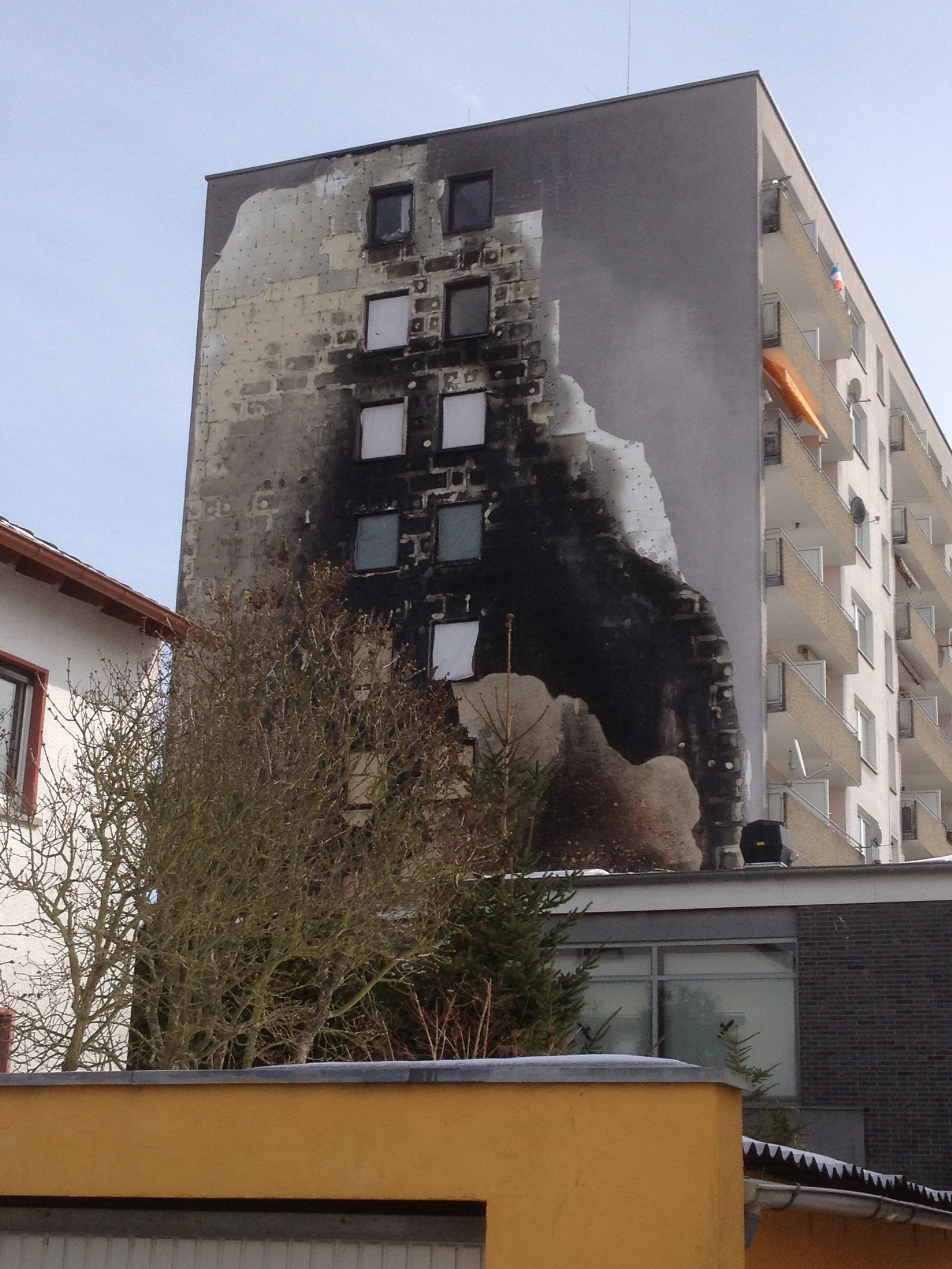 Brandschaden der WDVS-Fassade des Hochhauses neben dem Bürgerhauses Steinbach.